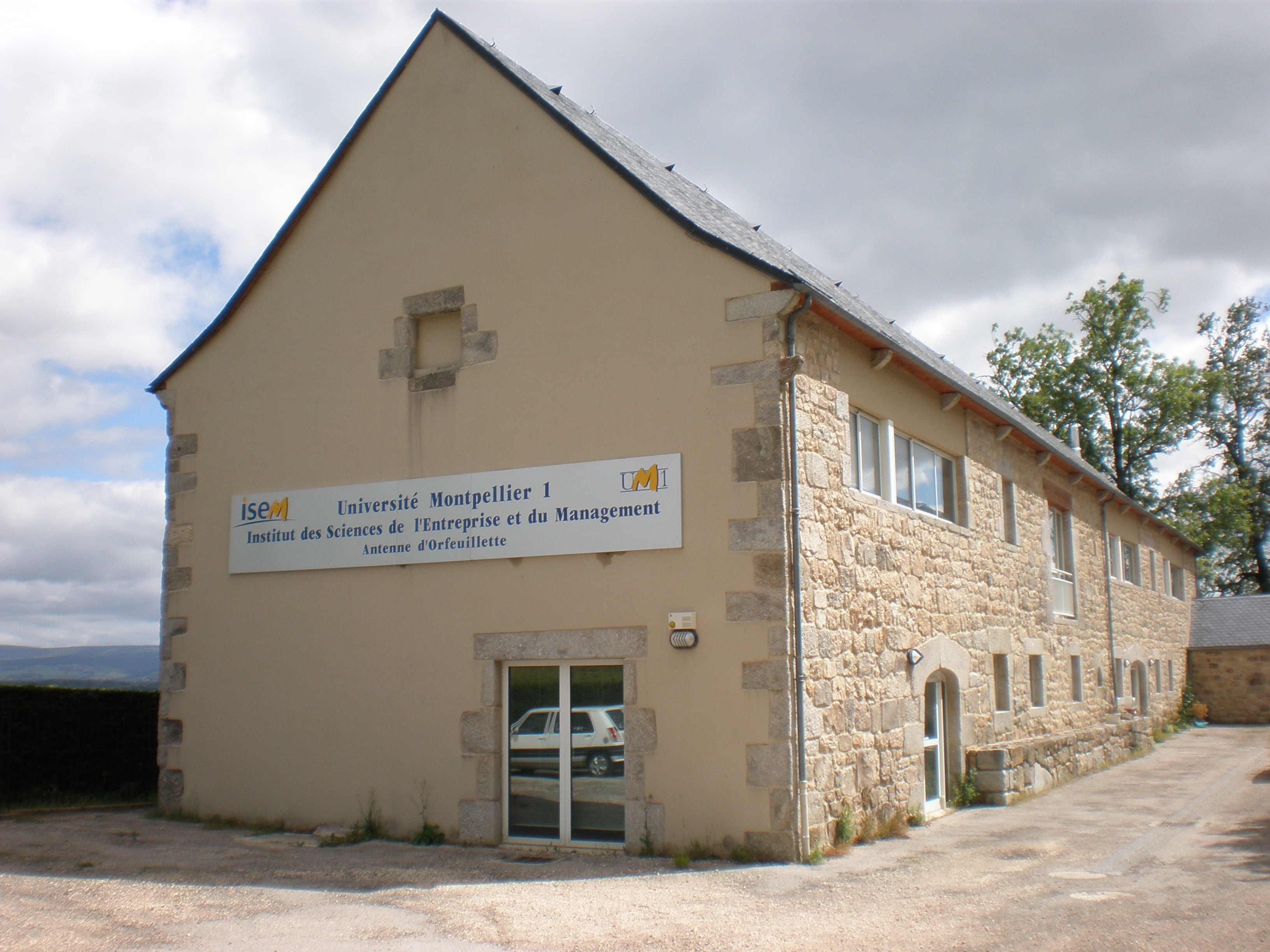 Locaux de l'antenne de l'ISEM (Institut des Sciences de l'Entreprise et du Management) Université Montpellier 1, d'Orfeuillette à Albaret-Sainte-Marie (Lozère)